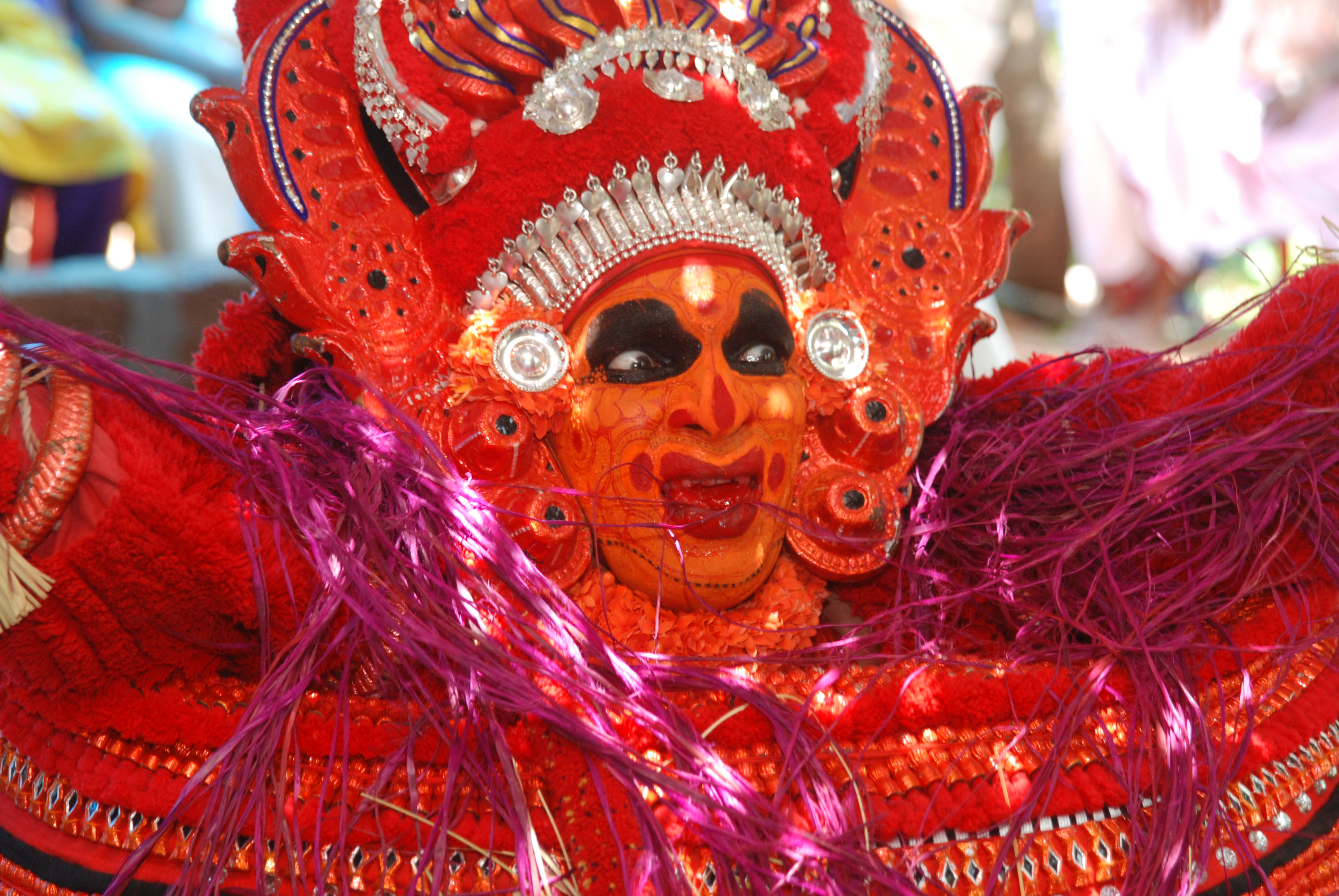 പരദേവത എന്നും വിഷ്‌ണുമൂർത്തി എന്നും അറിയപ്പെടുന്ന തെയ്യം 'ഉറയുന്ന' സമയത്ത് എടുത്ത ചിത്രം